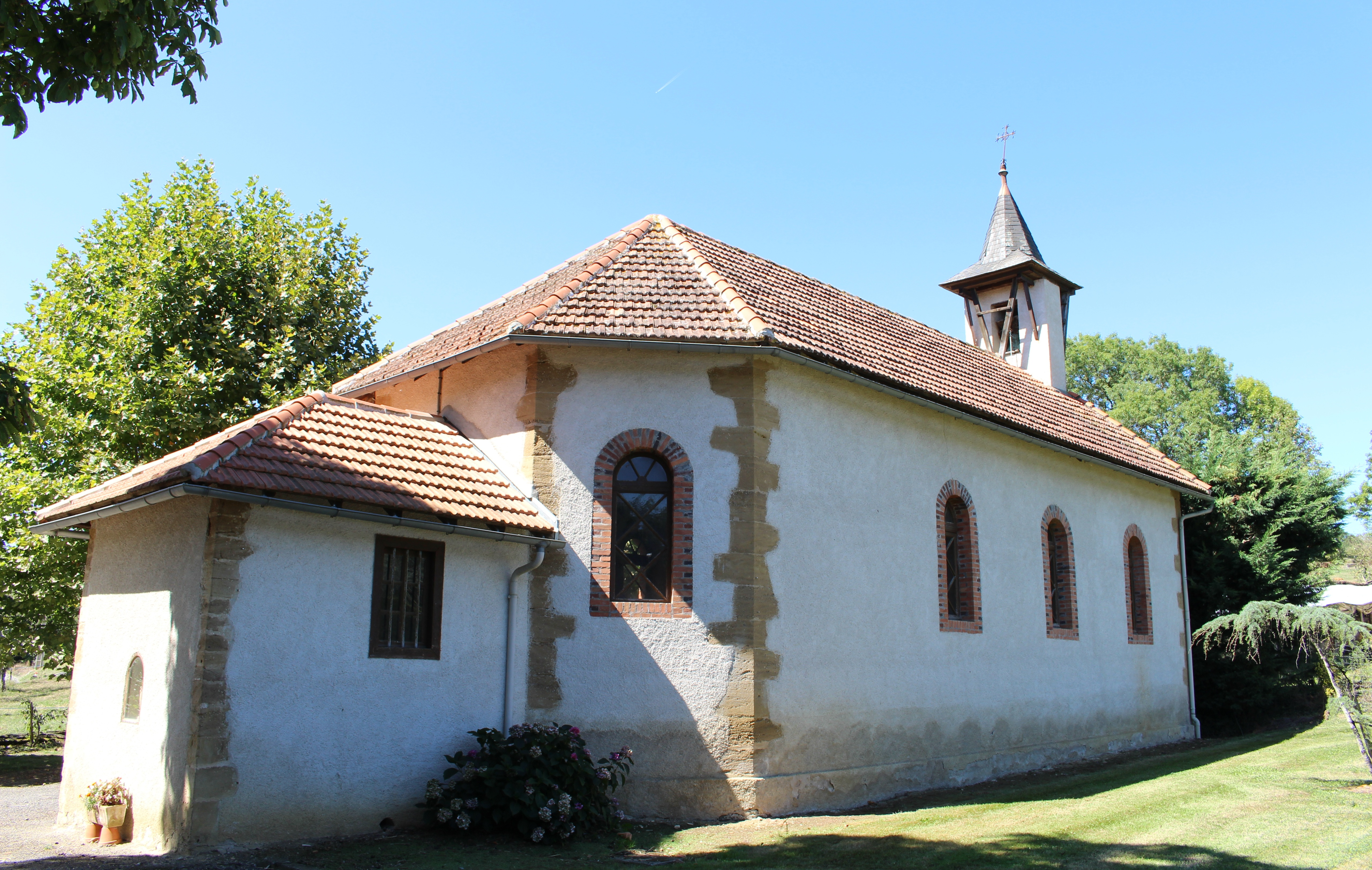 Église Saint-André d'Organ (Hautes-Pyrénées)